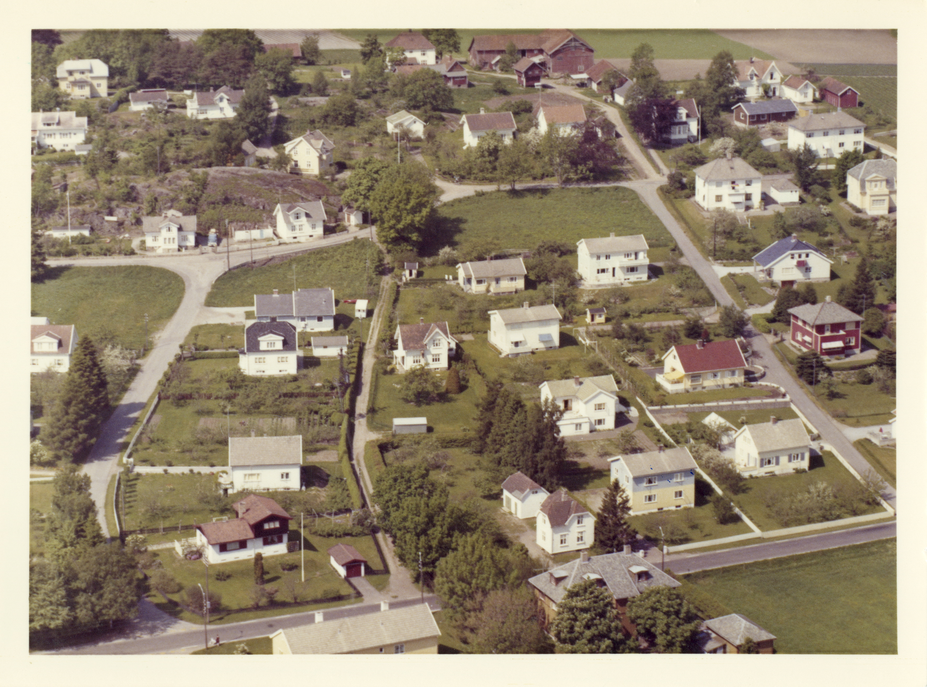 WF.S.164401